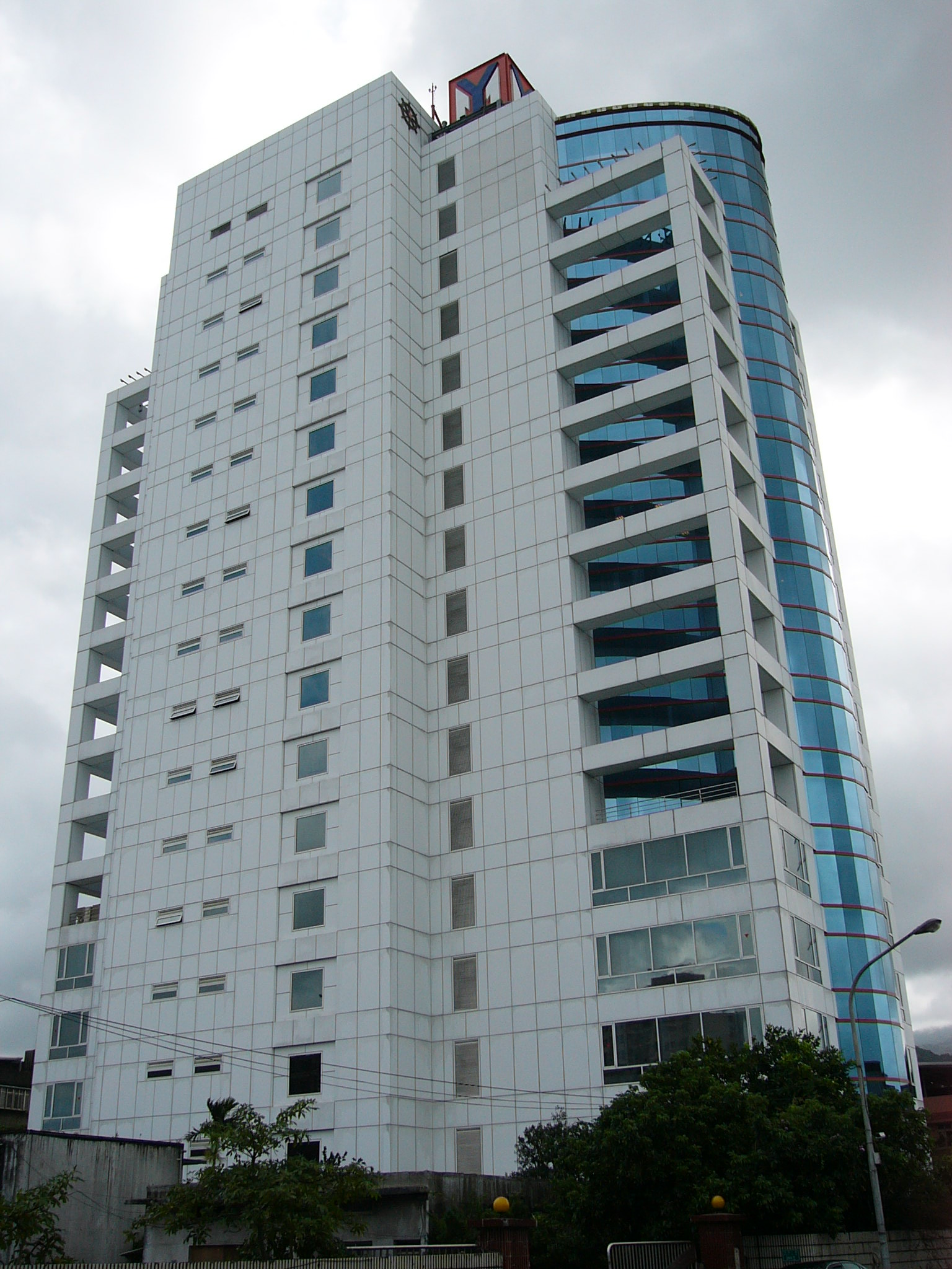 陽明海運總部左前方外觀。